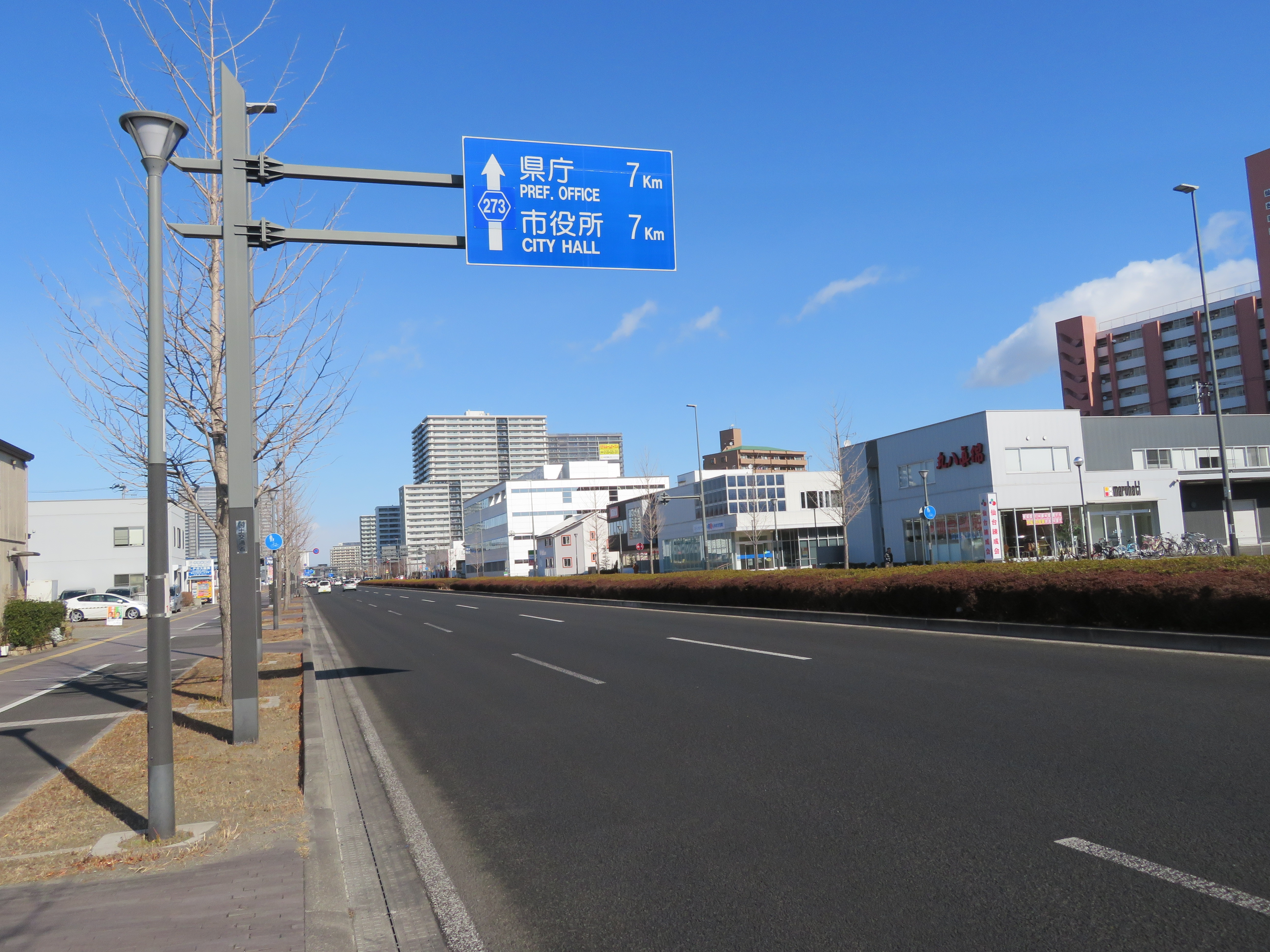 宮城県道273号線仙台市太白区あすと長町3丁目付近（長町駅方面を撮影） Canon PowerShot SX720 HS